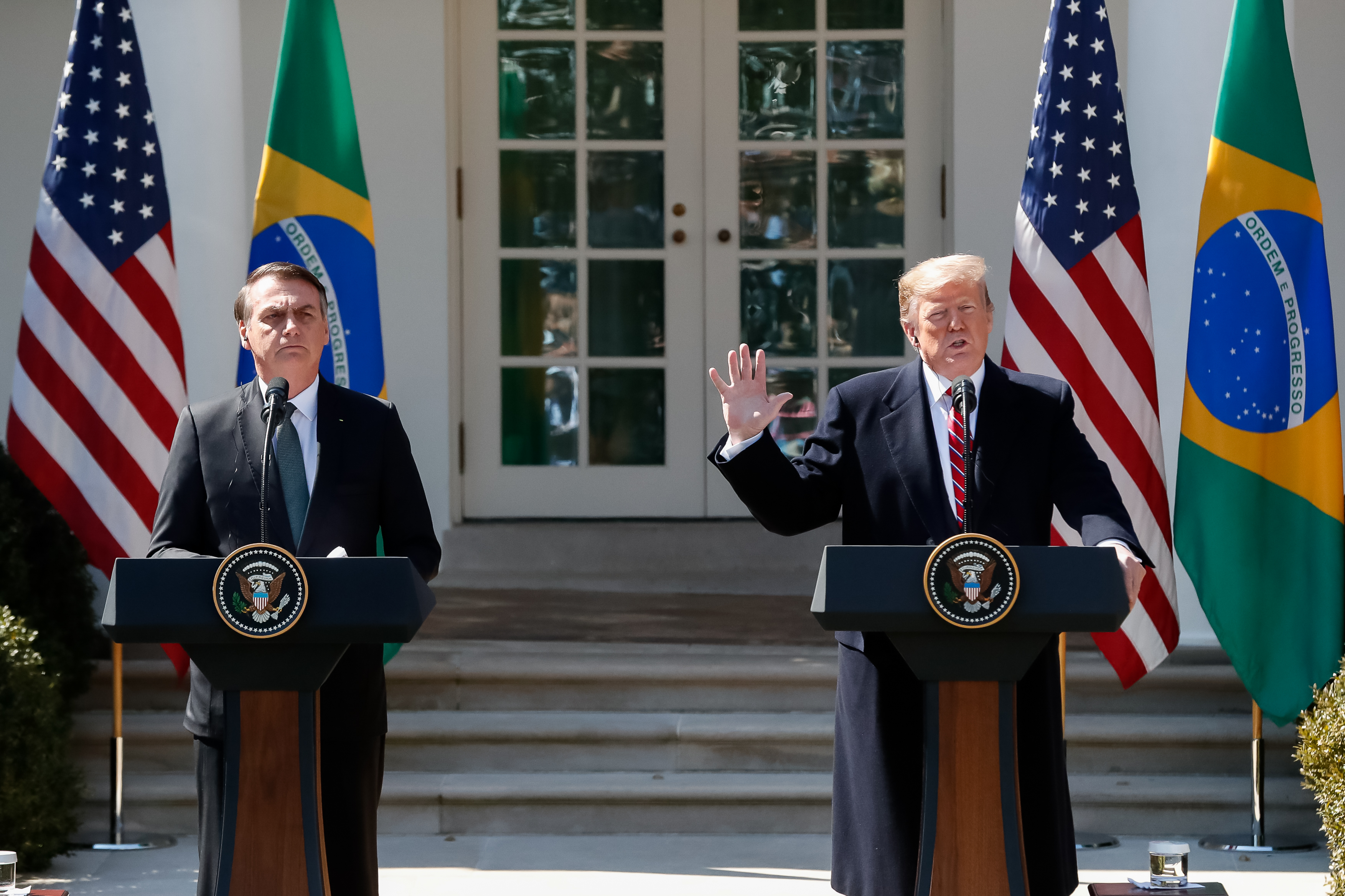 (Washington, DC - EUA, 19/03/2019) O Senhor Donald Trump, Presidente dos Estados Unidos da América, responde perguntas da imprensa durante o encontro. Foto: Alan Santos/PR